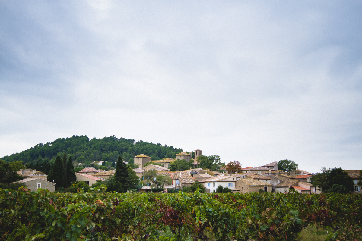 Vue de Fontcouverte